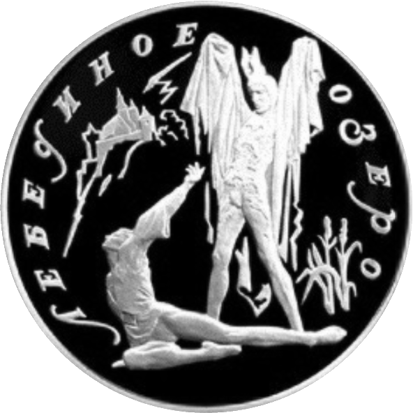 Монета Лебедине озеро.